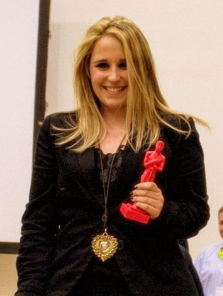 Carla Herrero recogiendo un galardón en los premios de Fundación Telefónica.